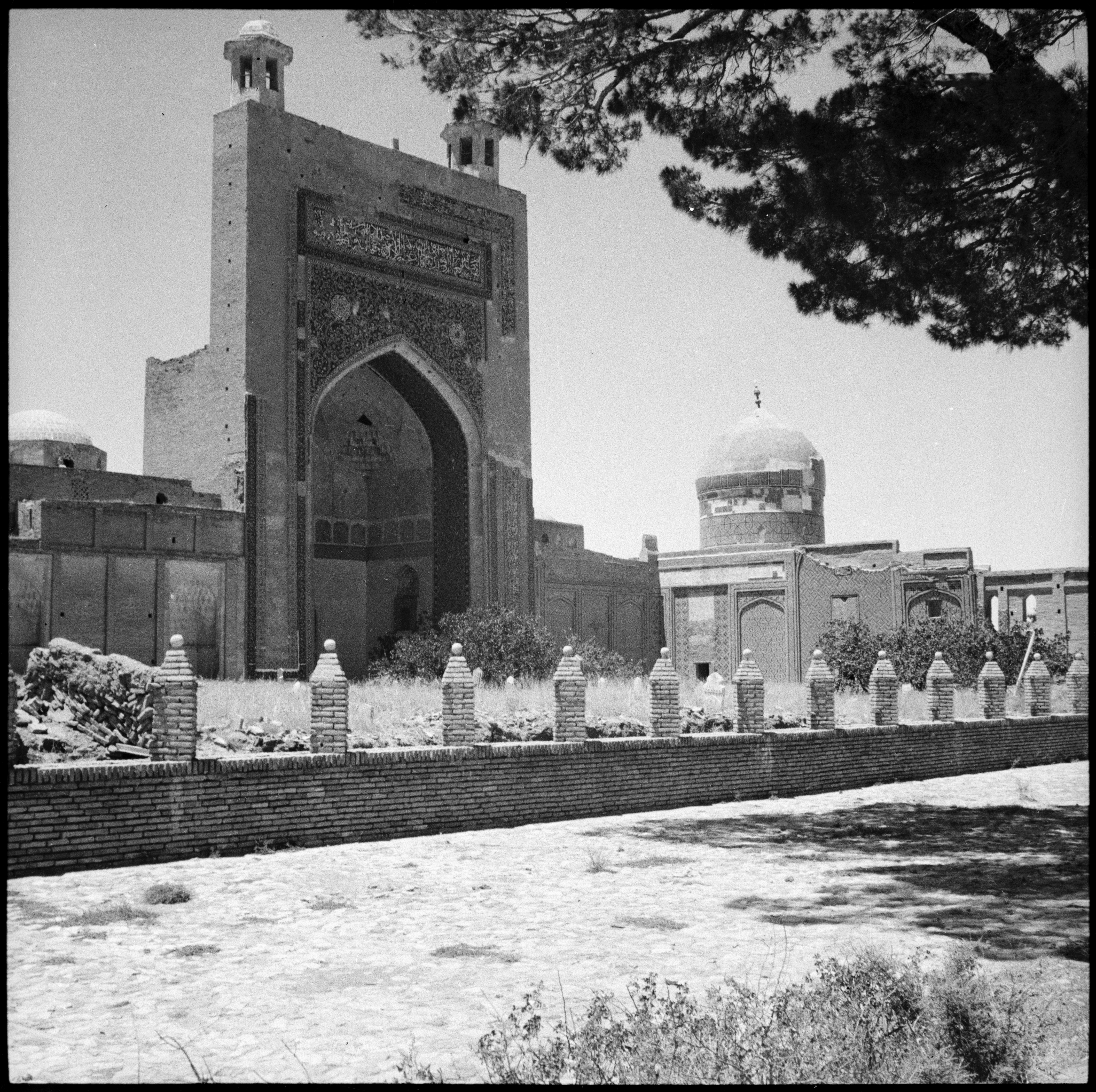 Iran, Turbat-i-Jam (Torbat-e Jam): Mausoleum; Eine Halle, dahinter eine Kuppel